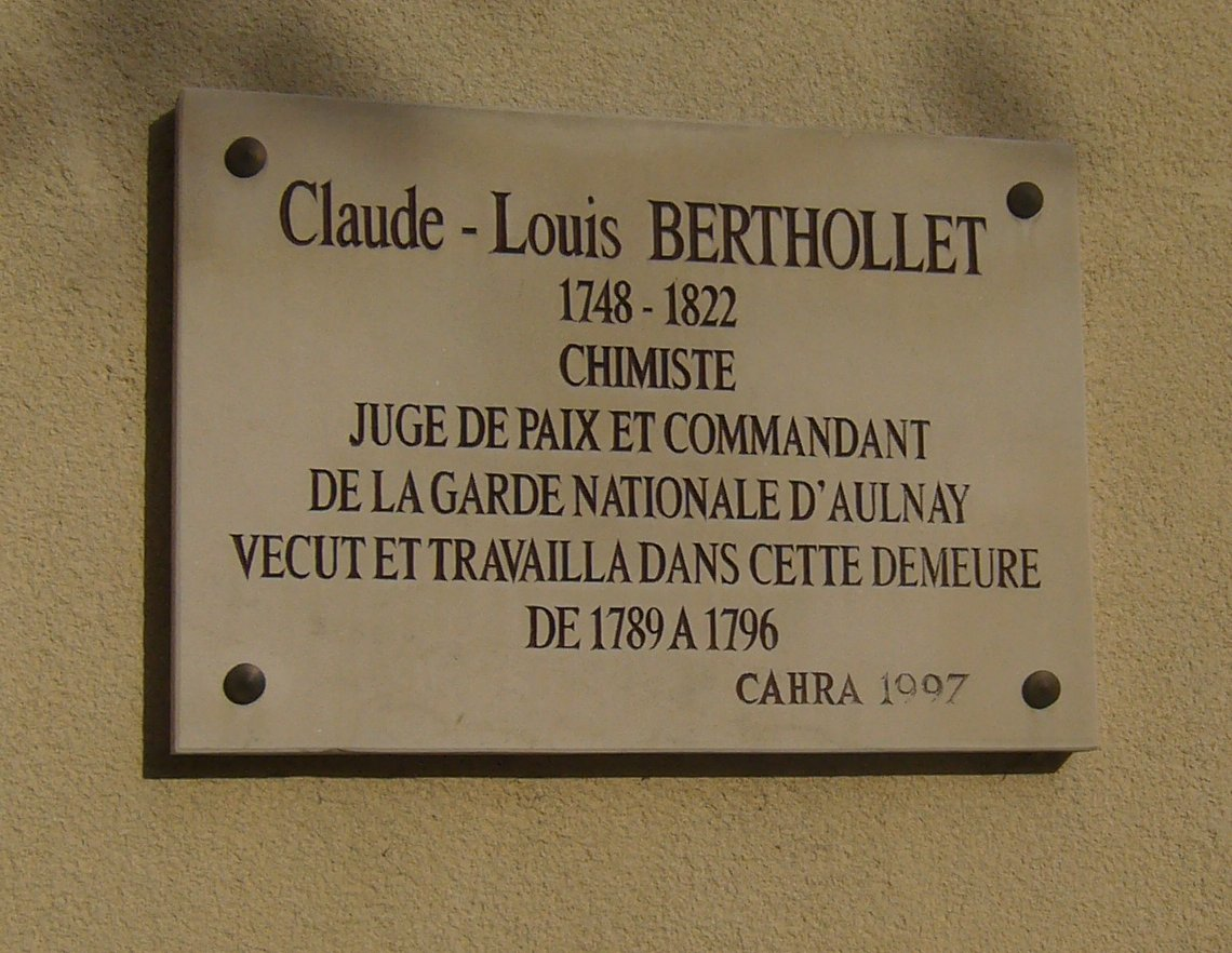 Plaque à propos de Claude_Louis Berthollet (1748-1822) sur la maison de Gainville à Aulnay-sous-Bois (France)